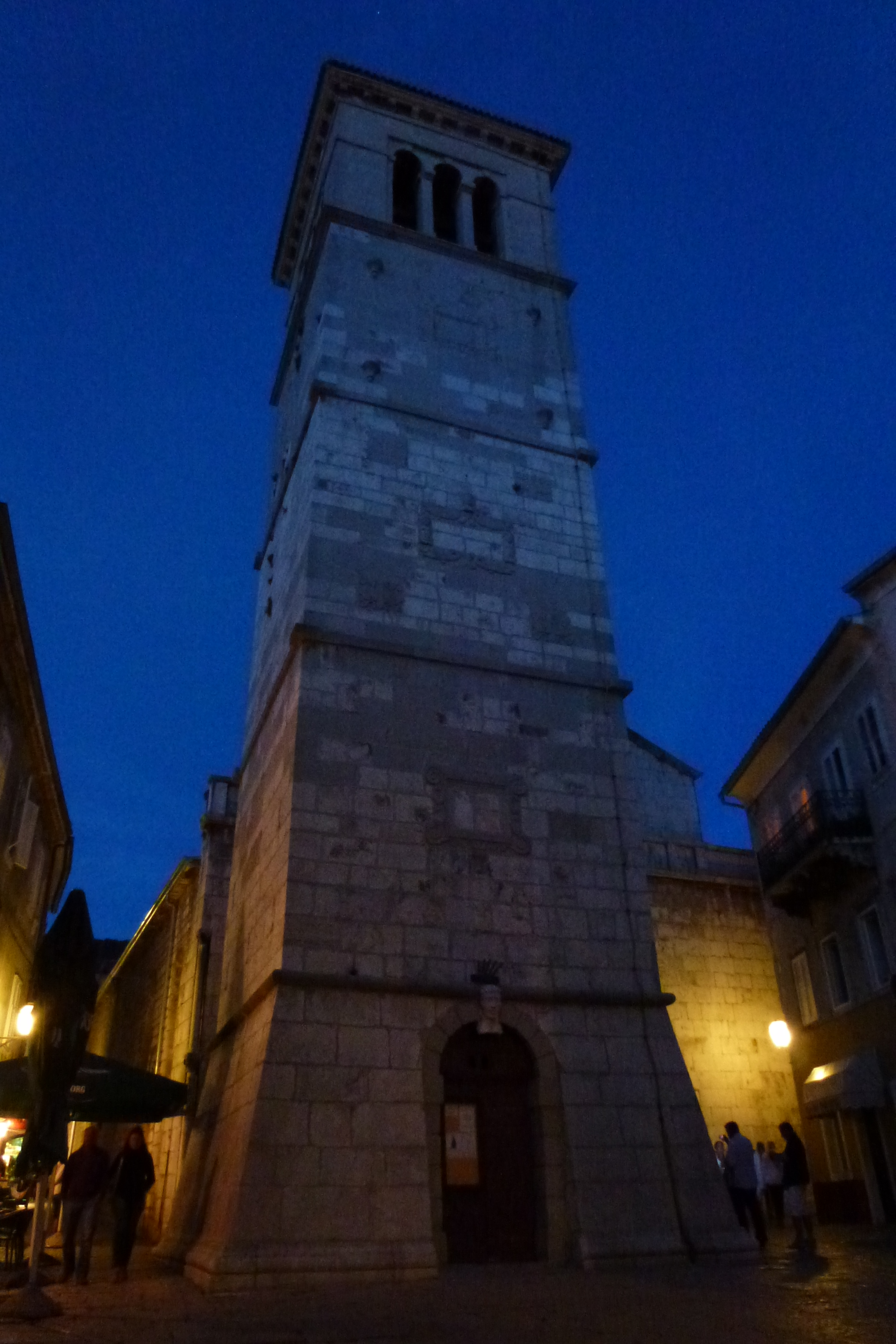 župna crkva sv. Marije Sniježne, Cres